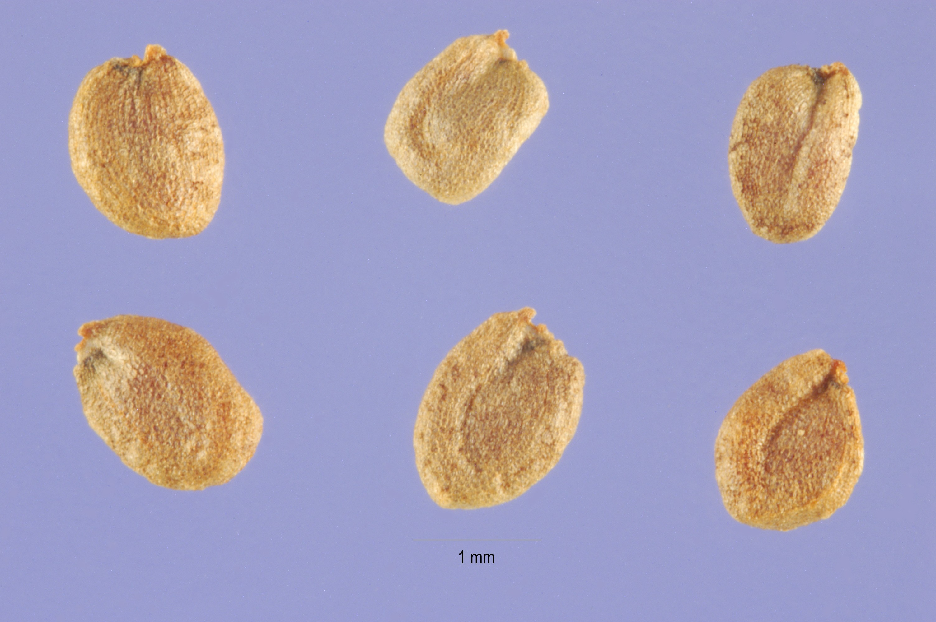 Сурепка обыкновенная Barbarea vulgaris